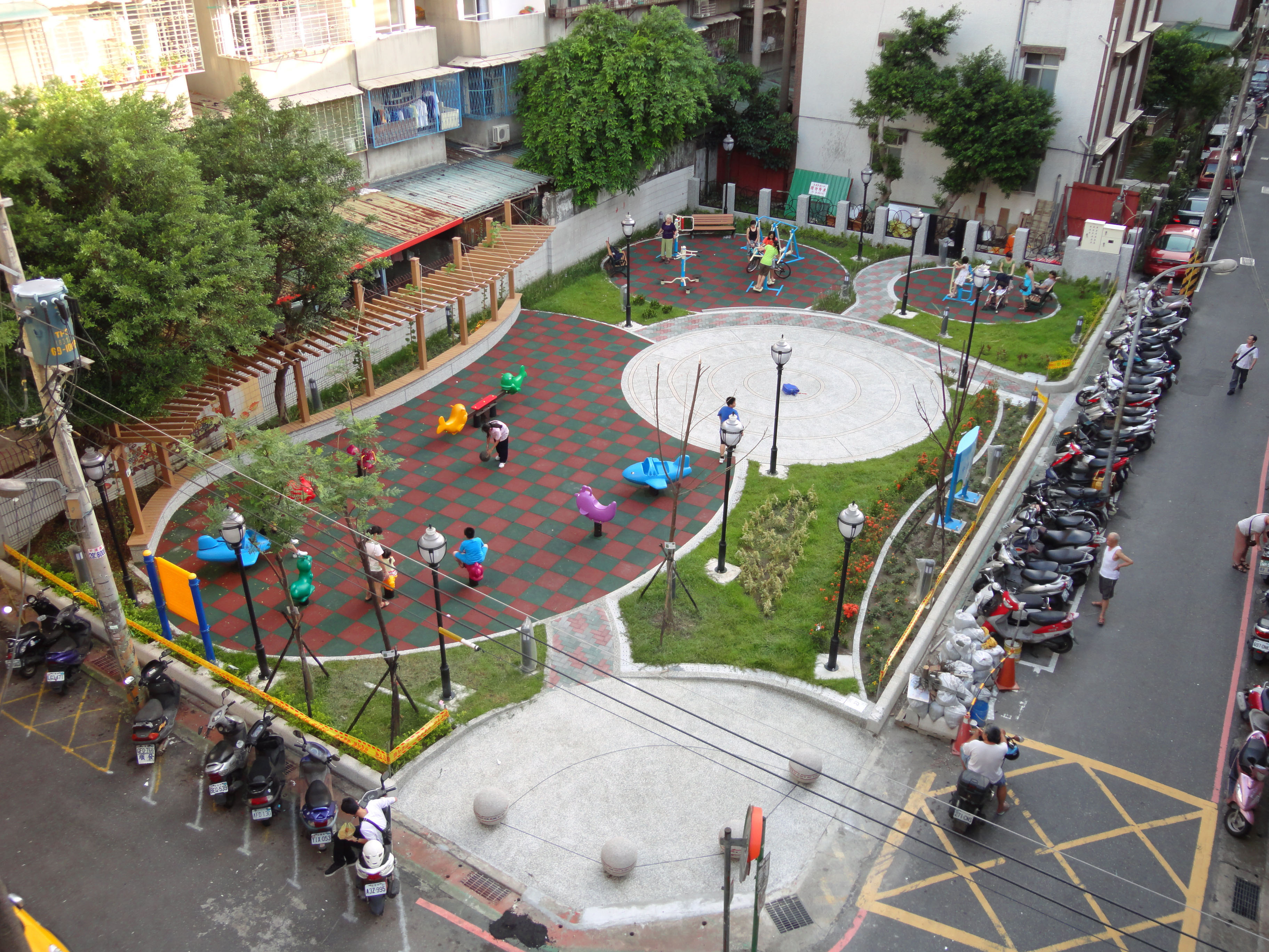 中文（台灣）: 鳥瞰新北市永和區中興社區公園。